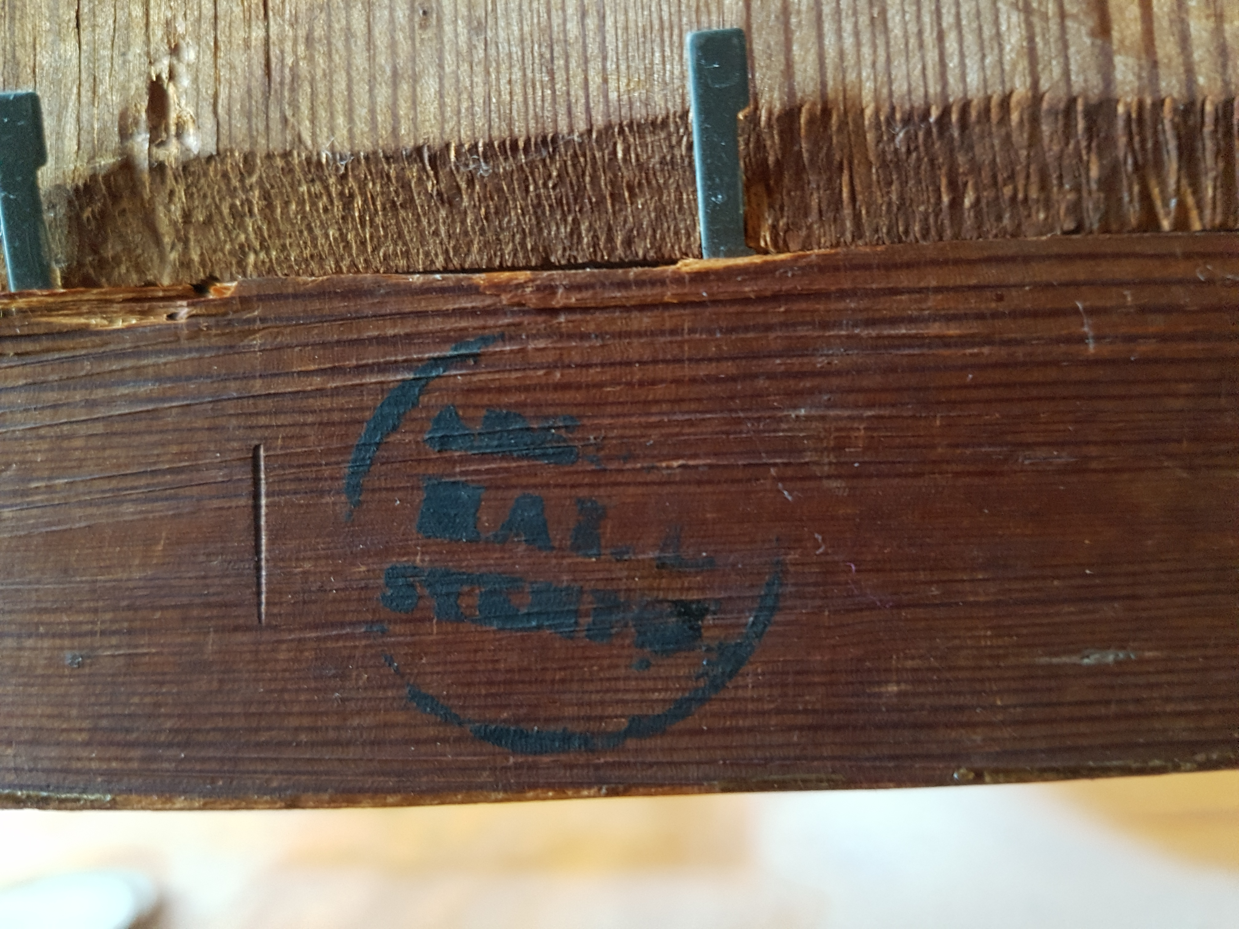 Fotografi av Arboga stads hallstämpel på baksidan av en spegel.